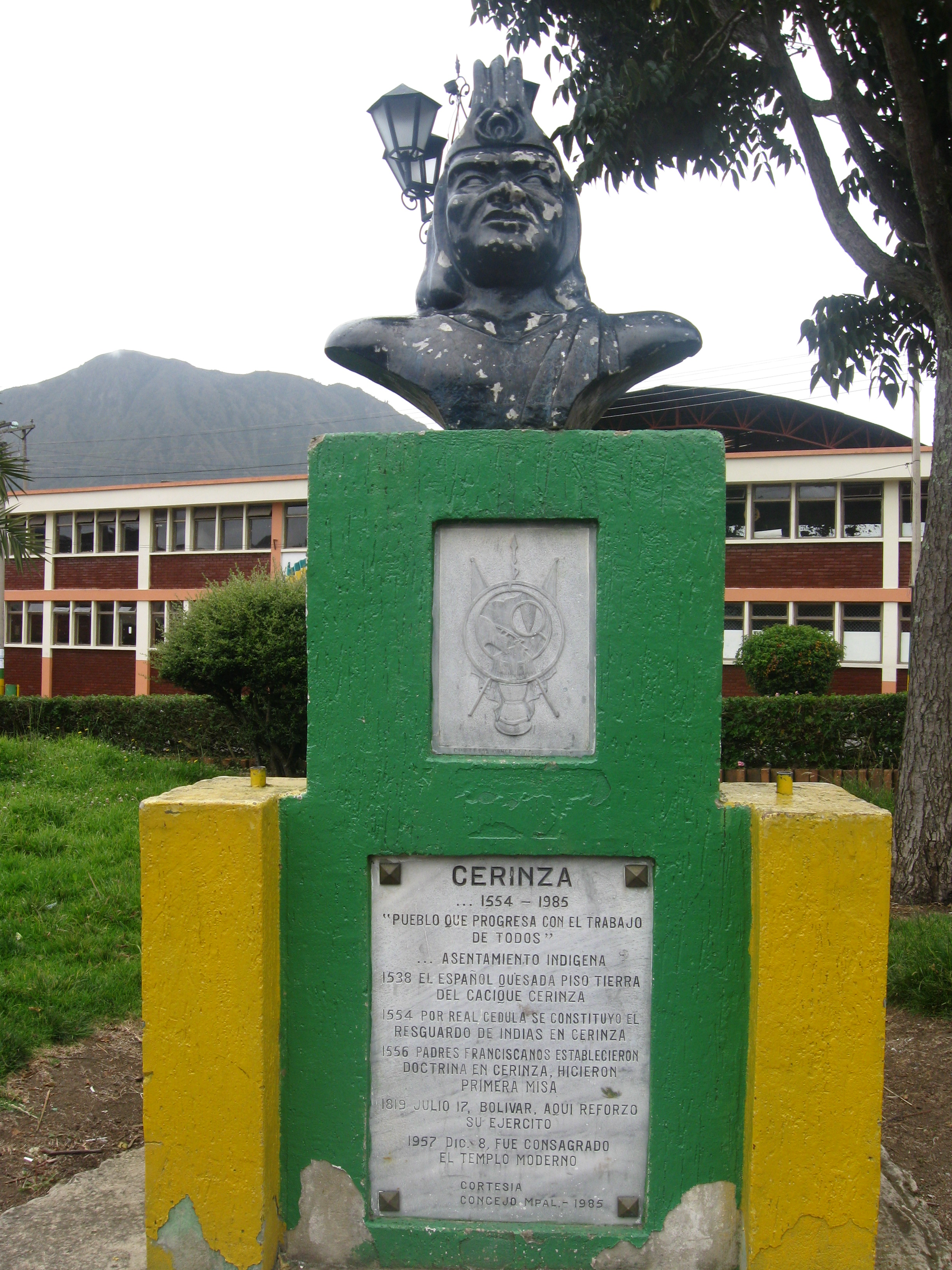 Busto de un Indigena en homenaje a la razo originaria de Boyaca.